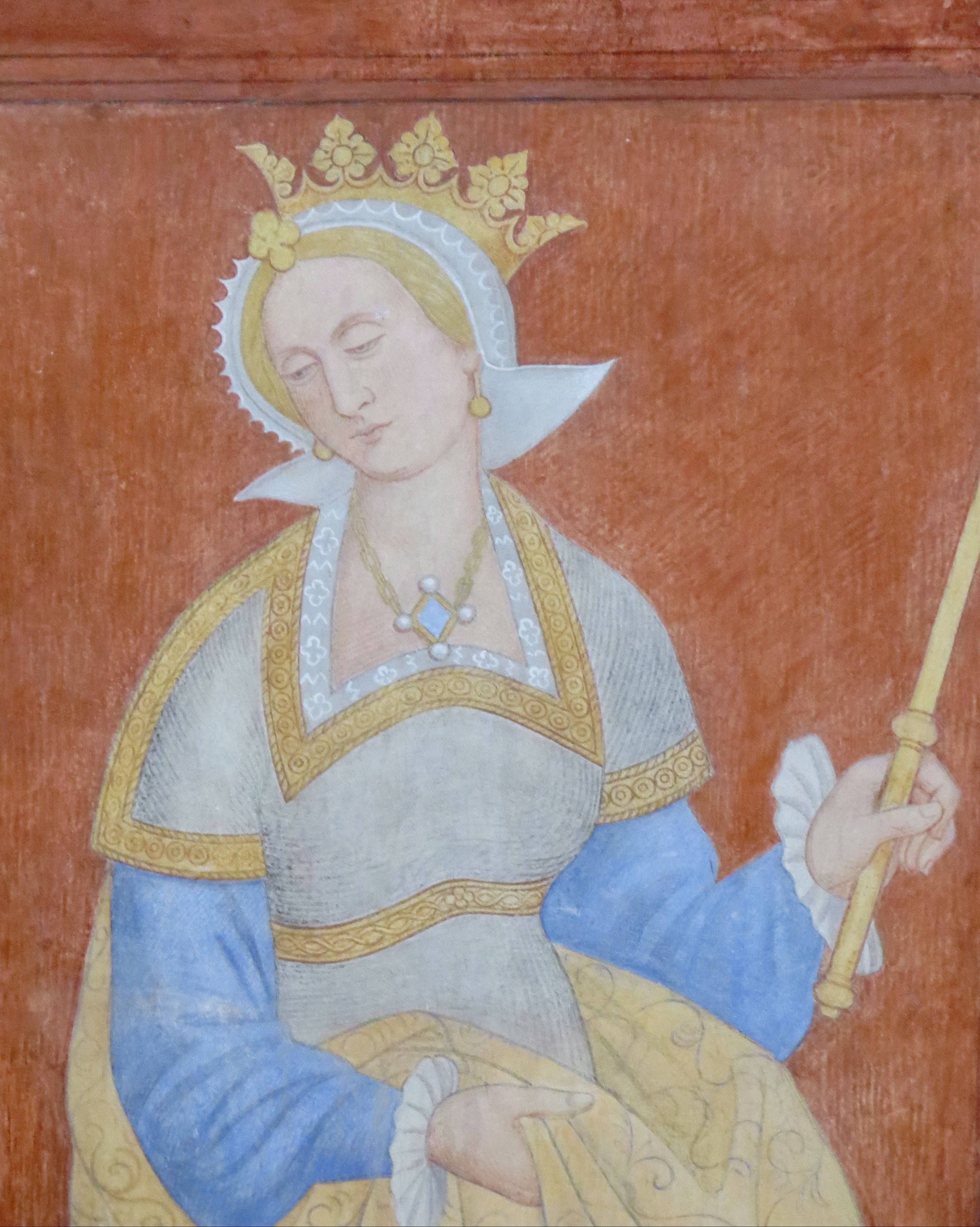 Dronning Margrethe-Estrid, kalkmaleri fra 1500-tallet i Roskilde Domkirke, Roskilde